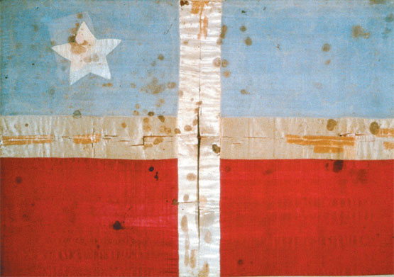 Bandera bordada para la proclamación de la independencia de Puerto Rico